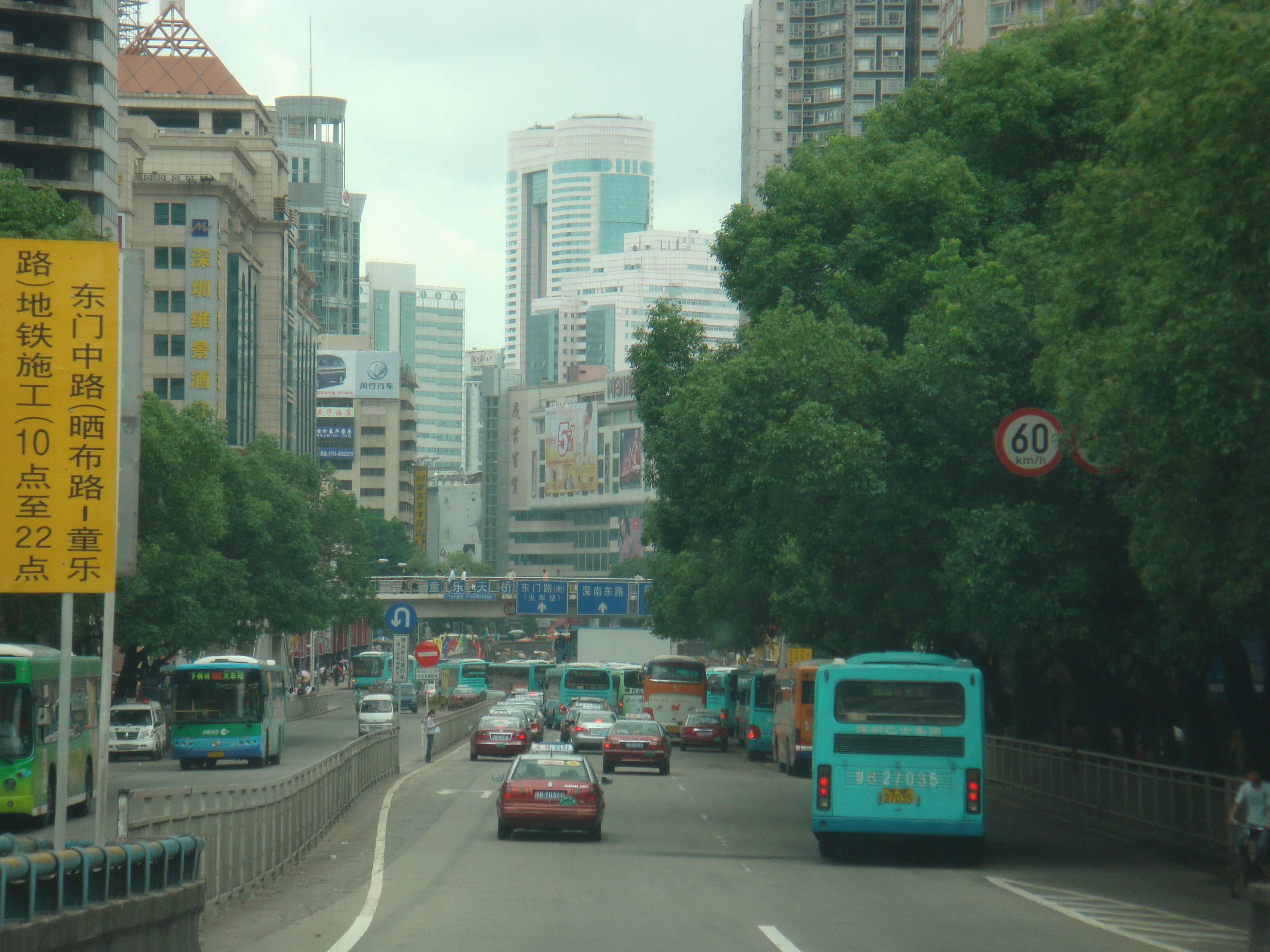 深圳 東門中路